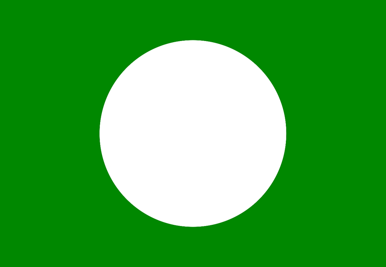 Logo Parti Islam SeMalaysia